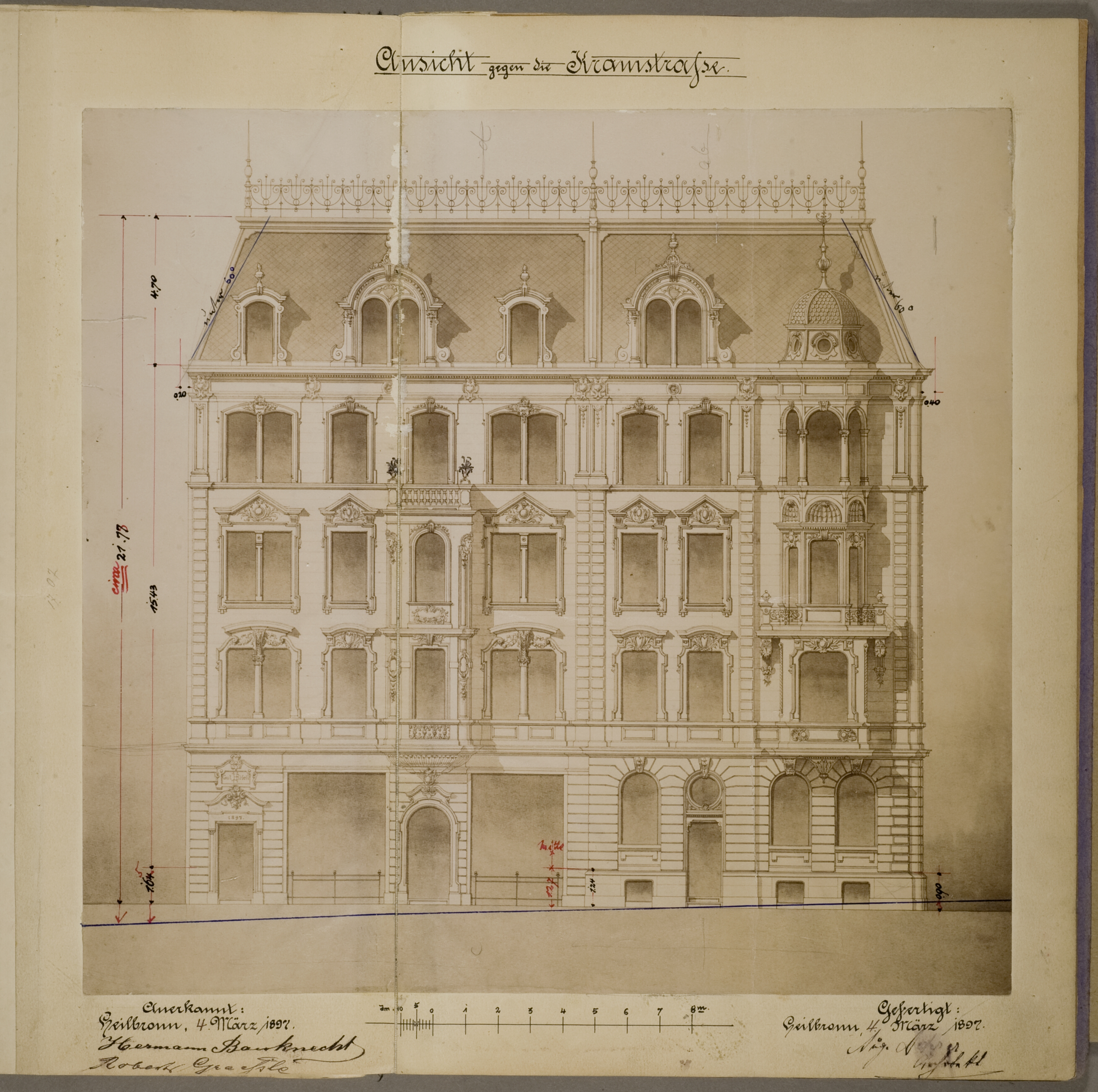 Doppelhaus Kaiserstraße 33 und 35 in Heilbronn. Bauherr Nr. 33: Herrmann Bauknecht. Bauherr Nr. 35: Robert Graeßle. Erbaut nach Entwürfen des Architekten August Dederer. Bekanntes Café des Weinwirts Wilhelm Holl im Haus 35.